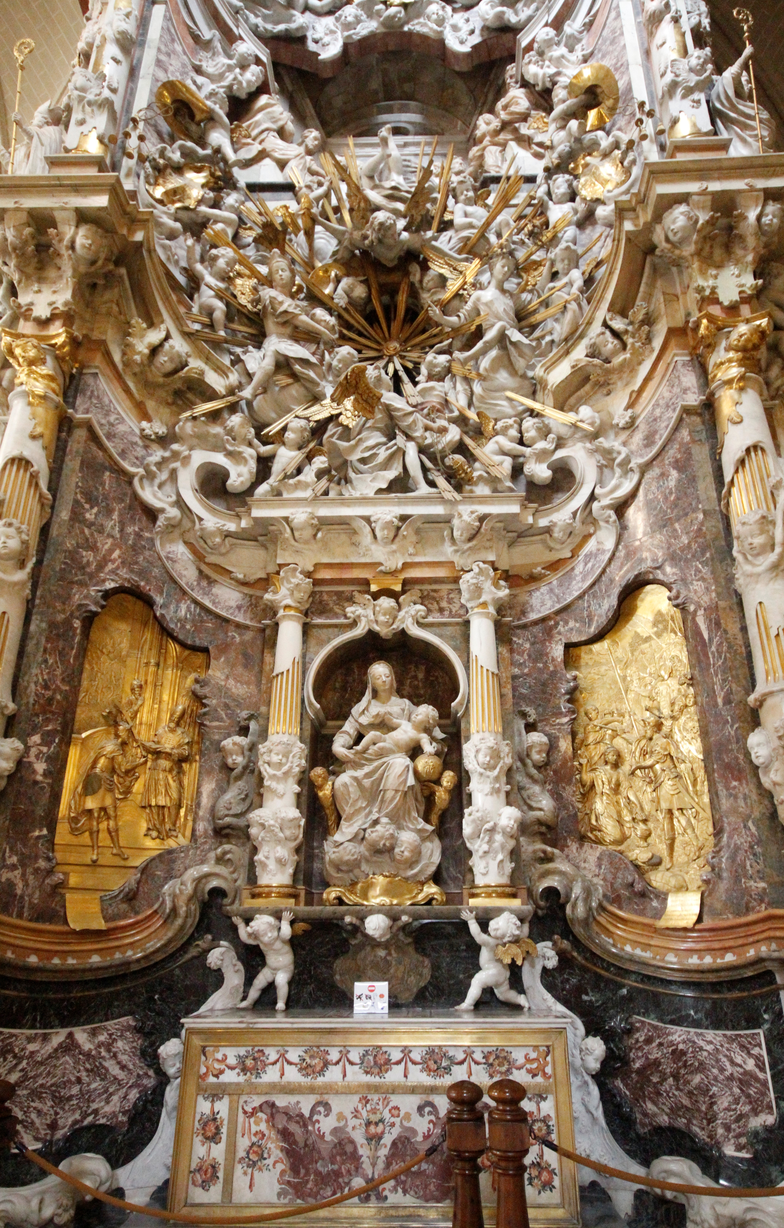 "Transparente"